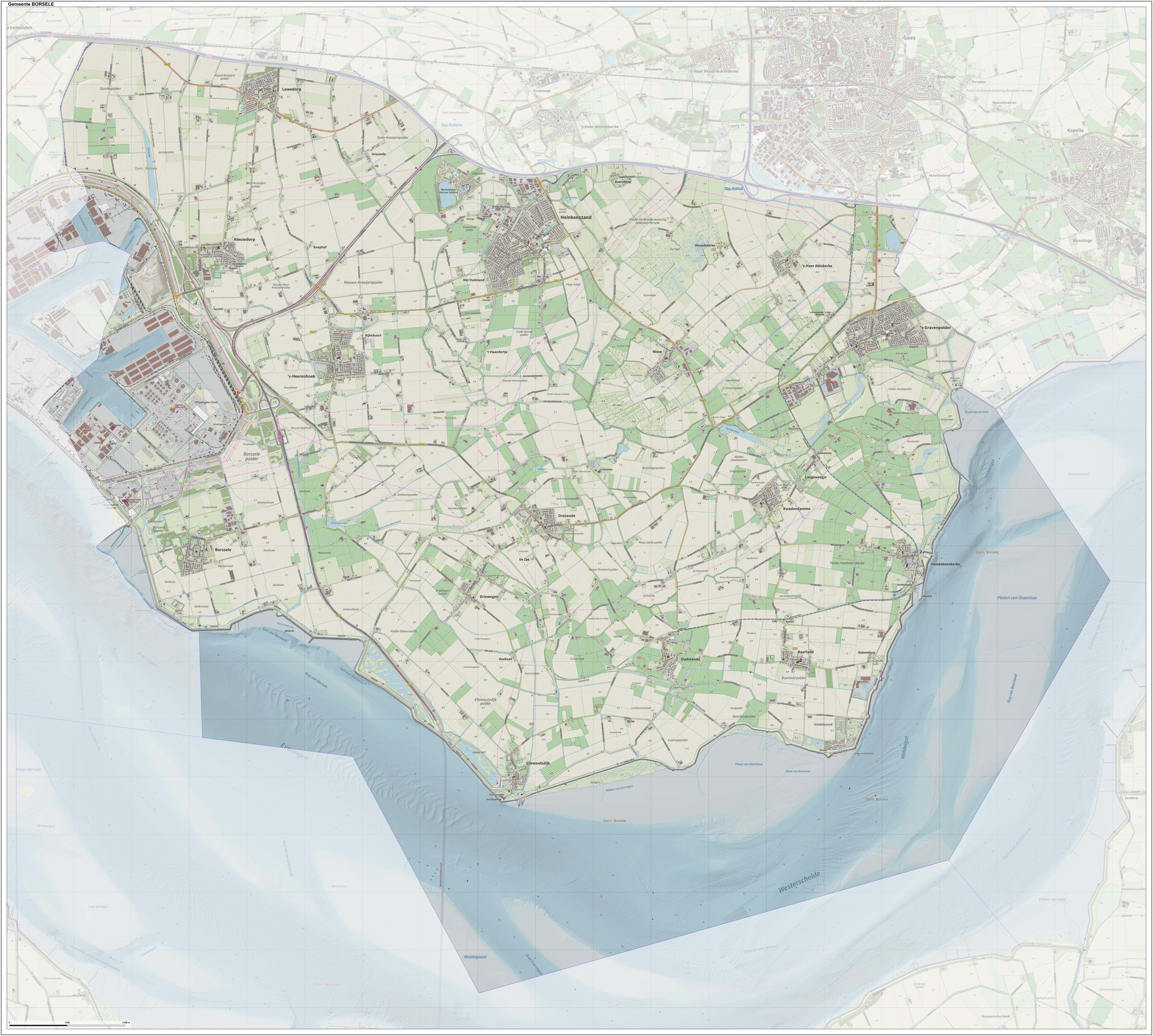 Topografische gemeentekaart. Resolutie: 400 pixels/km. Kaartbeeld samengesteld uit de open geodata van de Top10NL en Top25namen (Kadaster), Creative Commons-BY licentie. Gebouwvlakken uit open geodata BAG extract. Wegen uit de OpenStreetMap, OpenStreetMap community. Reliëfschaduw uit de Actuele Hoogtekaart AHN2. Samenstelling en kleurenschema: Jan-Willem van Aalst, met QGIS. Zie ook de Legenda.